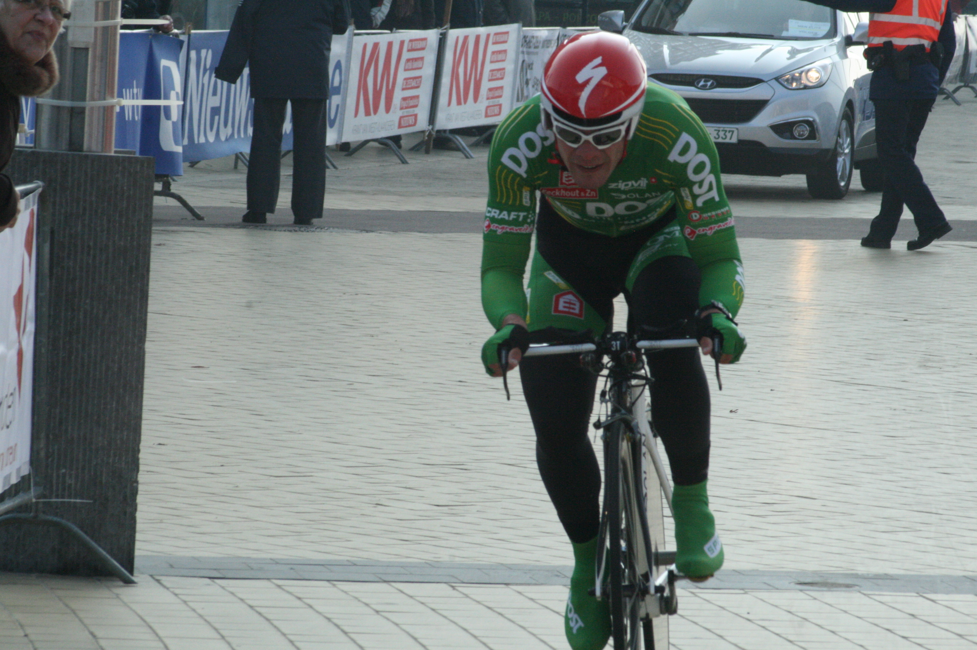 Driedaagse van West-Vlaanderen 2011, proloog in Middelkerke